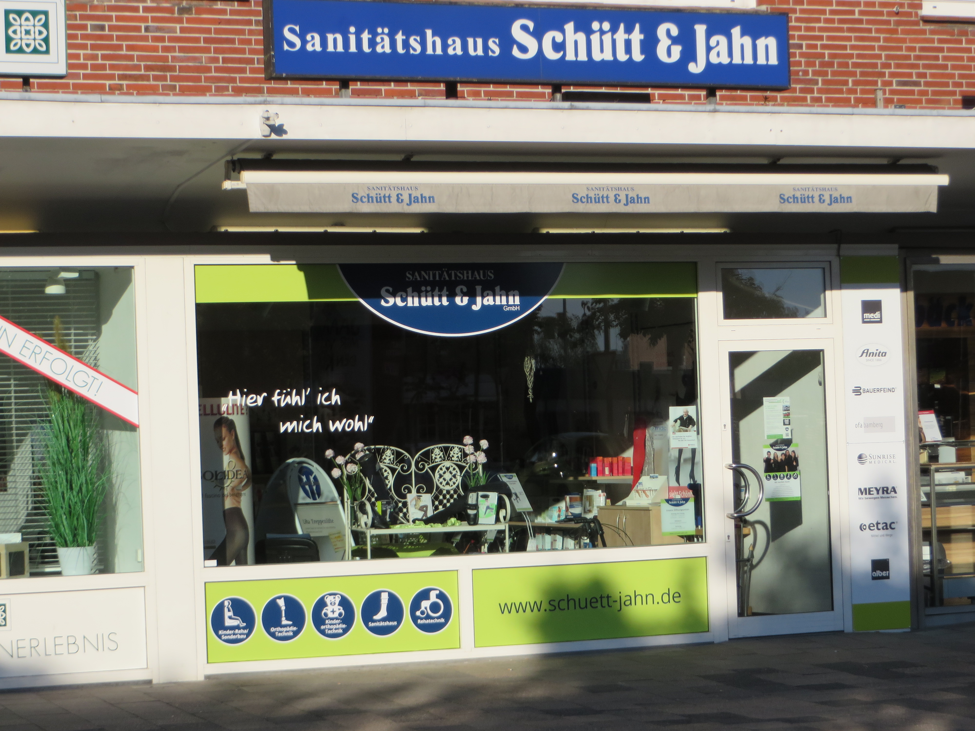 Sanitätshaus Schütt und Jahn am Twedter Plack (2015), Bild 02